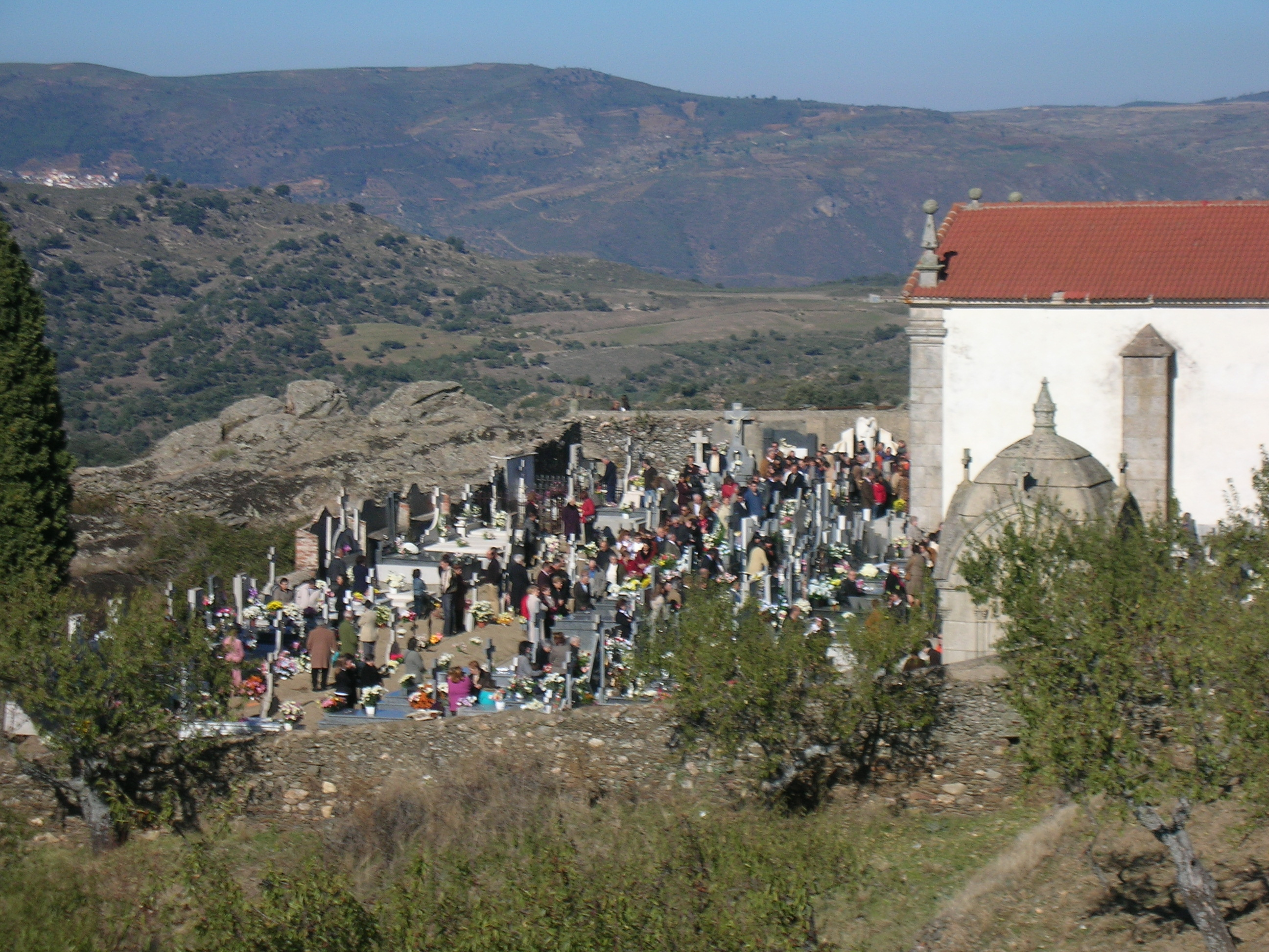 Ermita de la Virgen del Castillo y Cementerio de Vilvestre en el día de Todos los Santos de 2008.